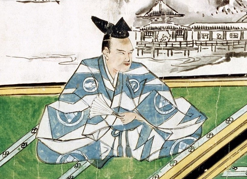 松前矩広の画像。『蝦夷国風図絵』の一部分で、アイヌからの使節に対峙している。